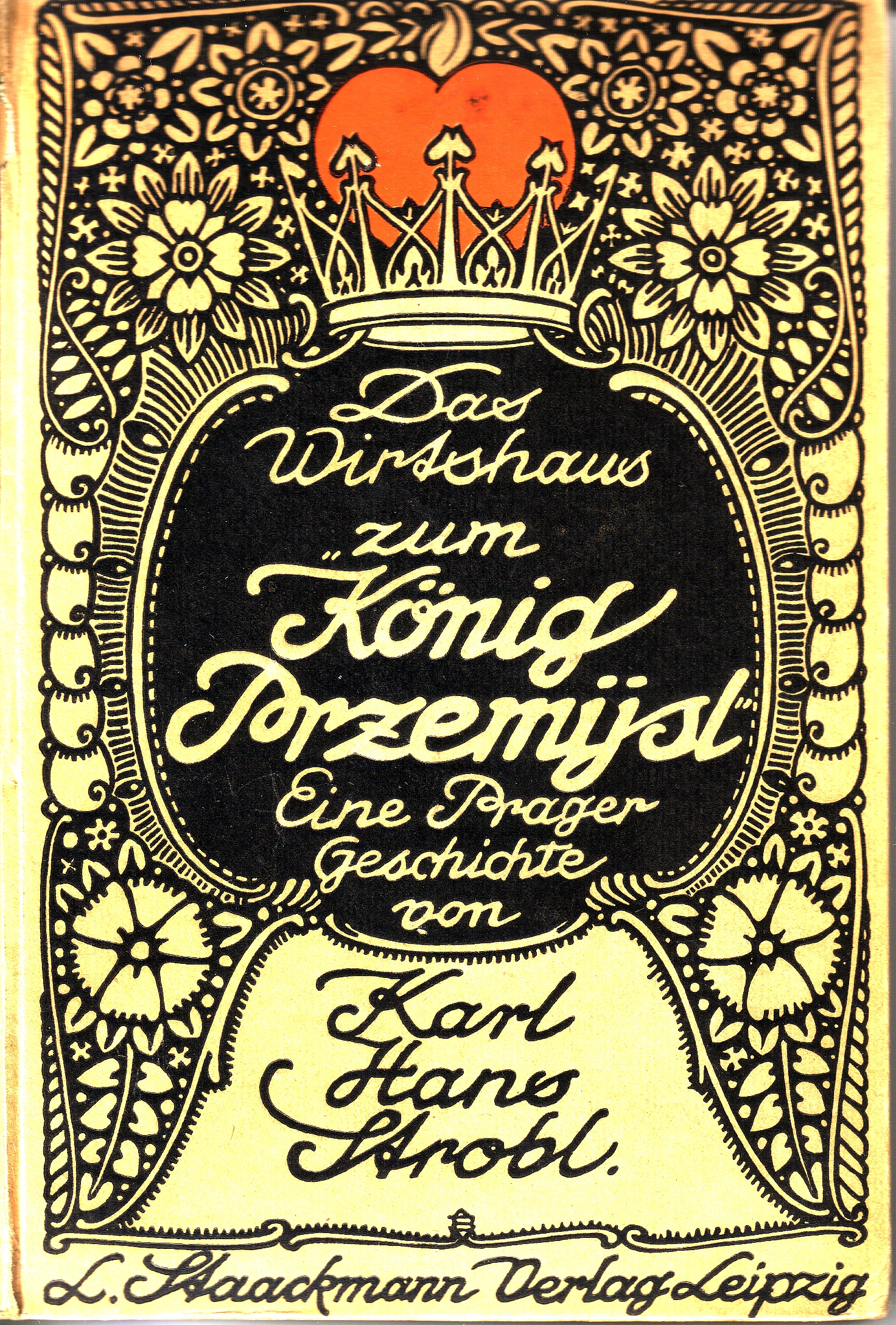 Titelbild zum Roman "Das Wirtshaus Zum König Przemysl" von Karl Hans Strobl